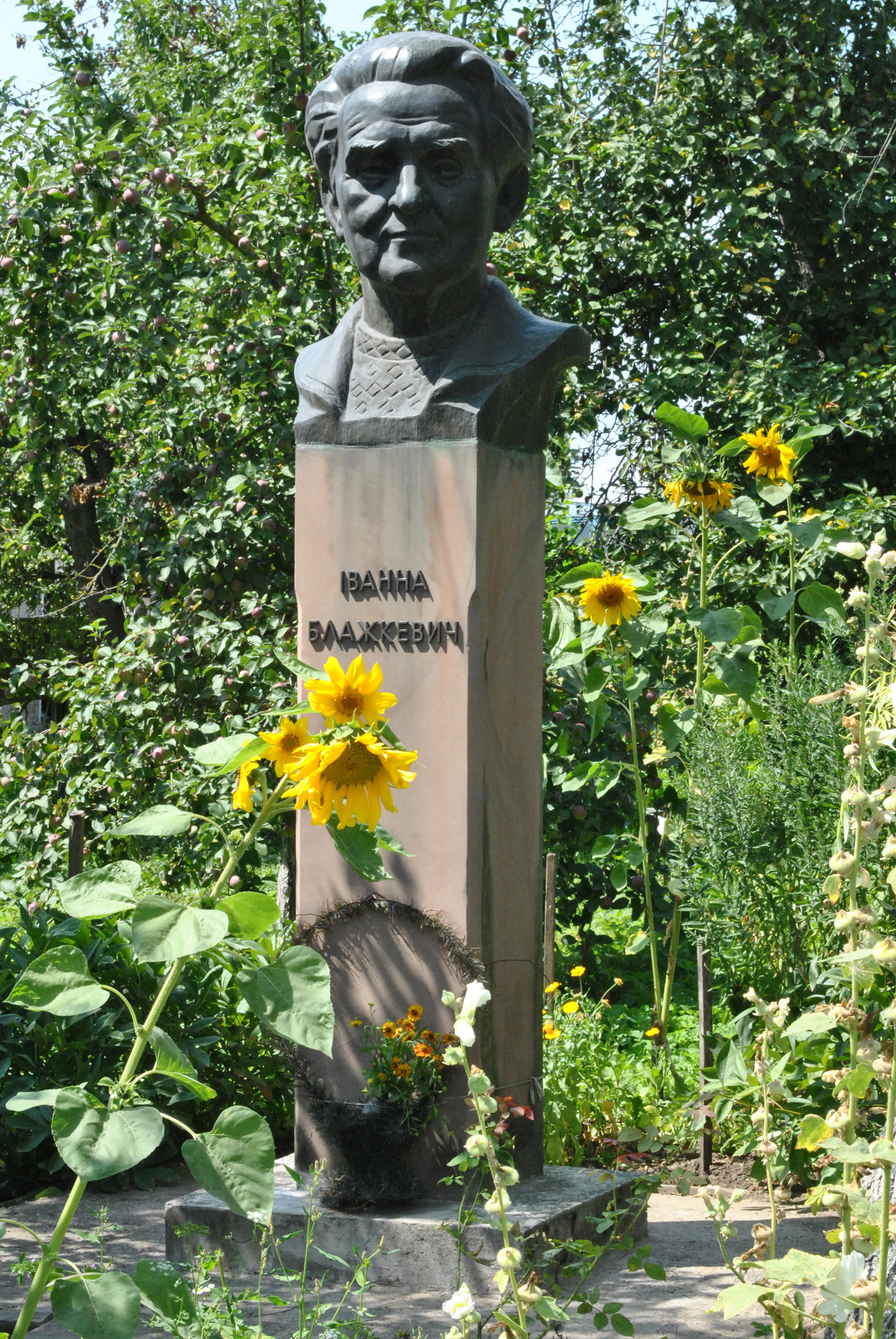 Пам'ятник письменниці Блажкевич Іванні Омелянівні в селі Денисів Козівського району Тернопільської області.